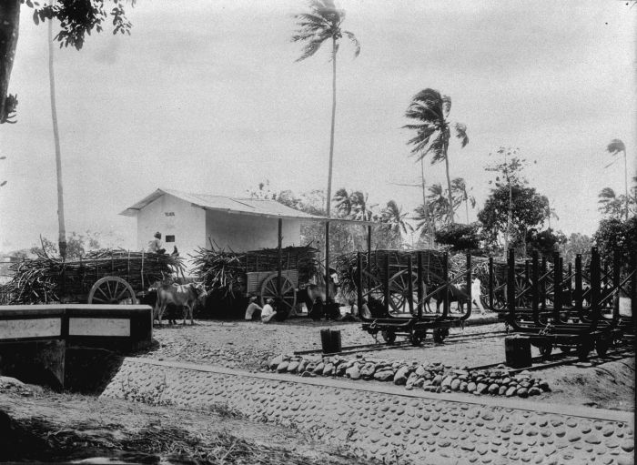 Foto. Riettransport met grobaks, tweewielige vrachtkarren, op het terrein van de suikerfabriek Tangaran op Oost-Java